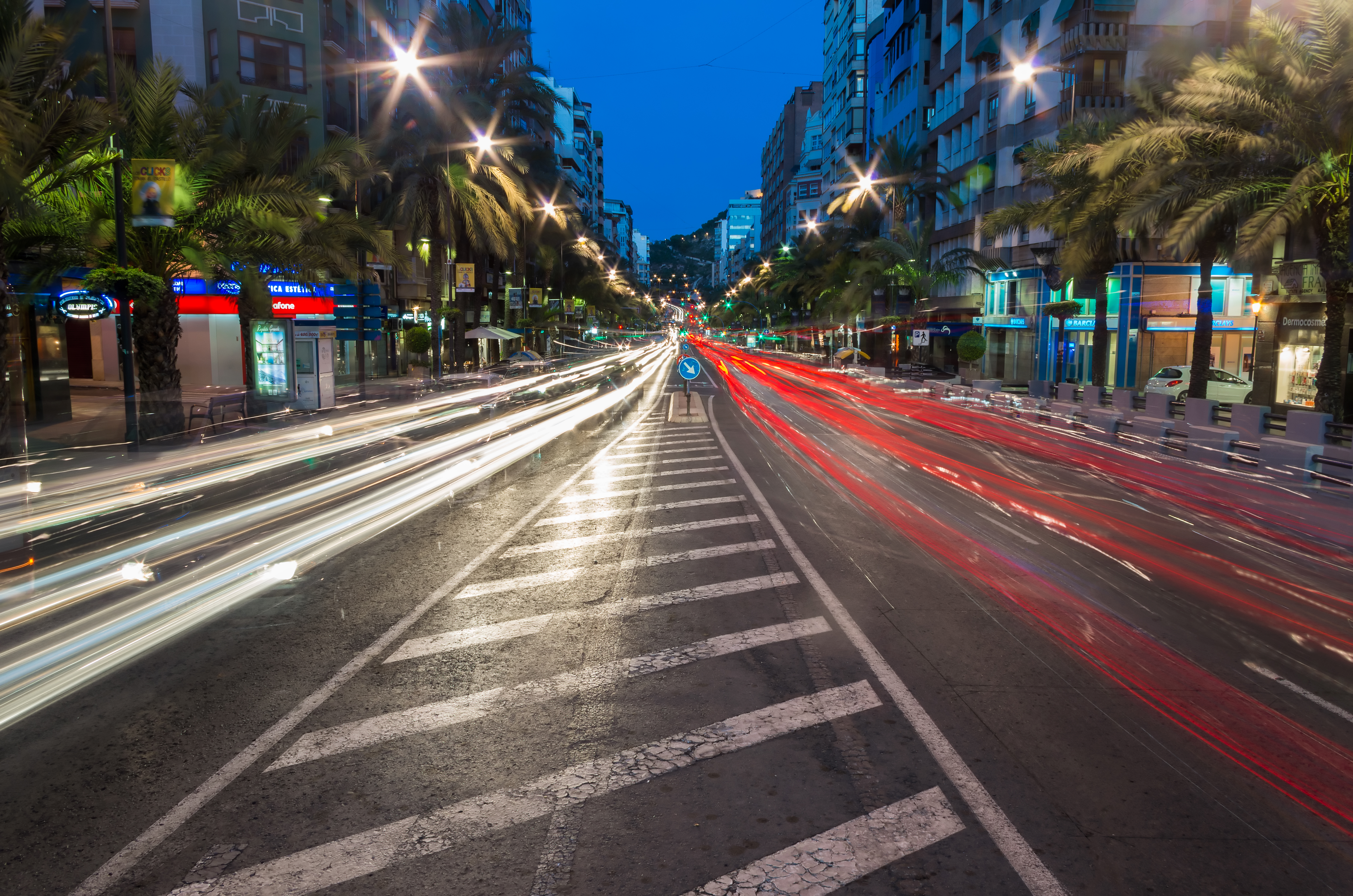 El ajetreo de la calle principal del centro de Alicante. "Alfonso el Sabio"